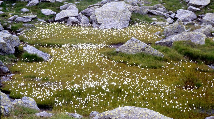 Scheuchzer-Wollgras (Eriophorum scheuchzeri Hoppe), Sauergräser (Cyperaceae), Bestand in einer Vermoorung oberhalb der Waldgrenze - Österreich/Austria/Autriche: Steiermark, Wölzer Tauern, W Hochweberspitz